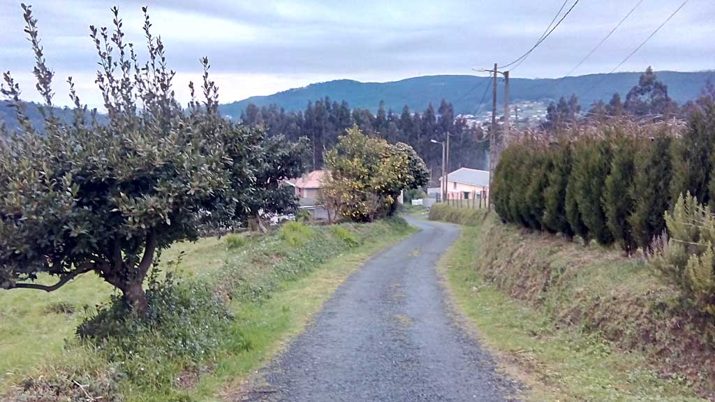 Vista do Igrexario, Doso, Narón.